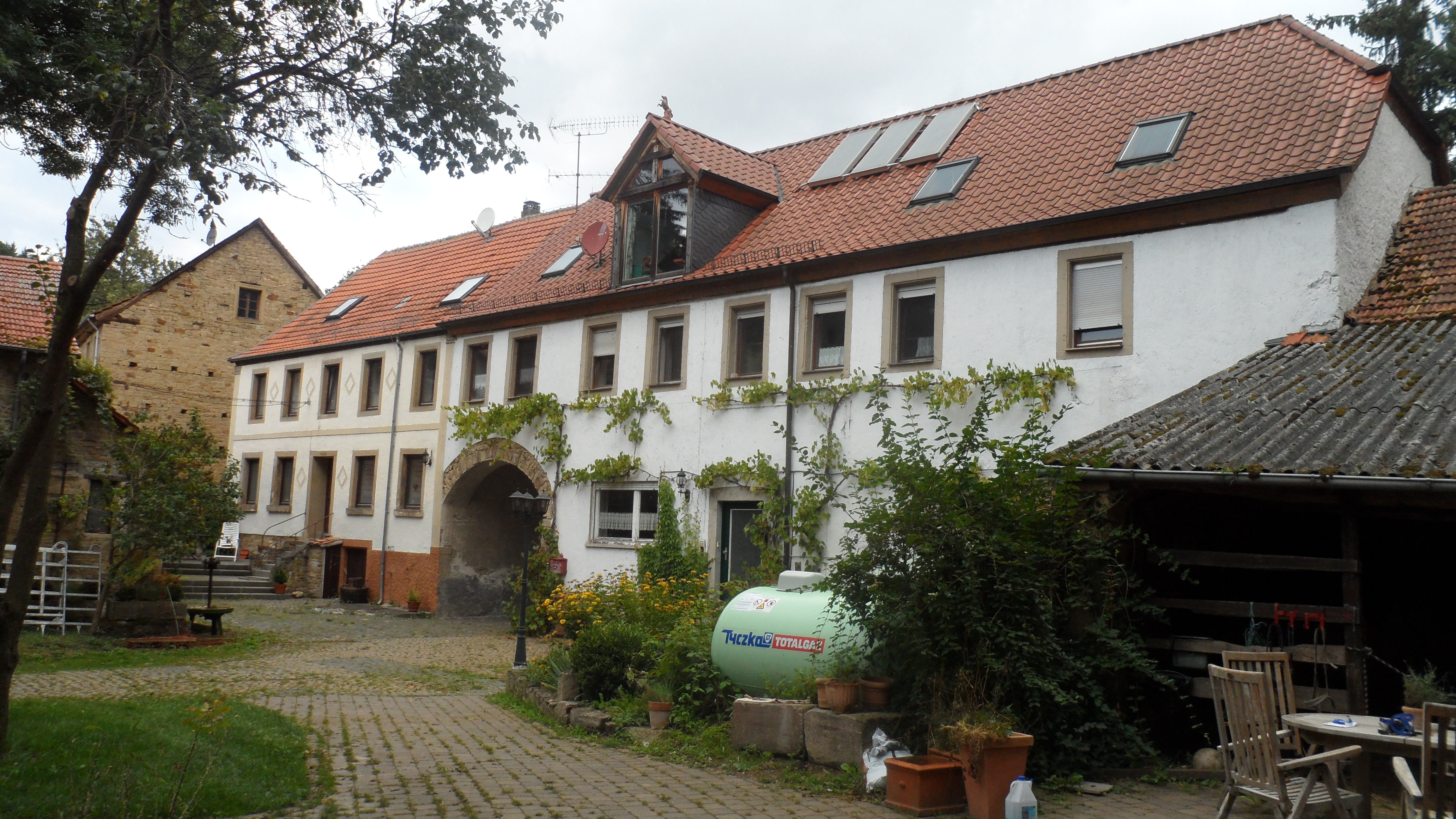 Montforterhof (Innenhof ) Duchroth , Kreis Bad Kreuznach